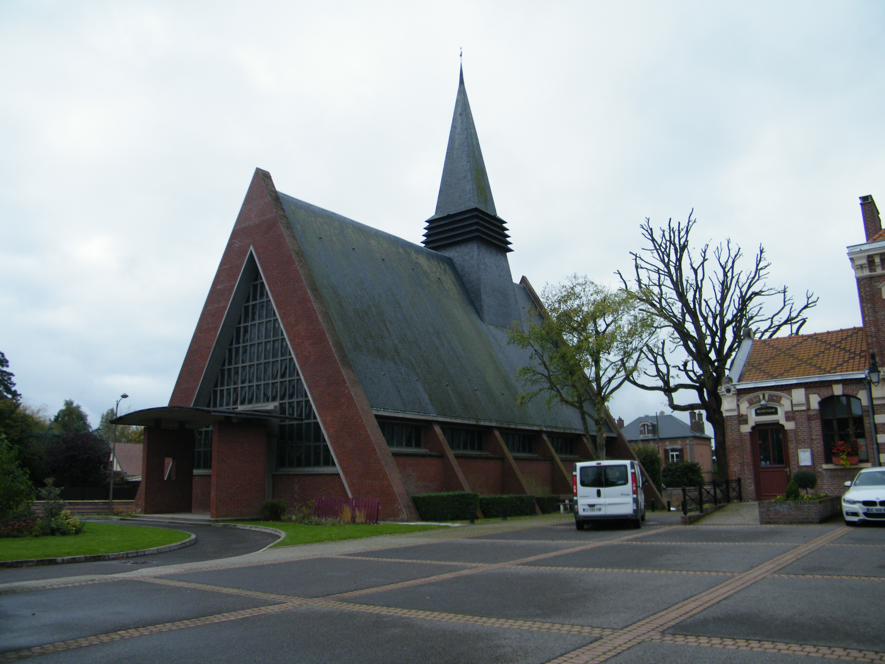 église.